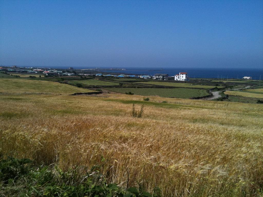 제주 우도, Jeju Udo